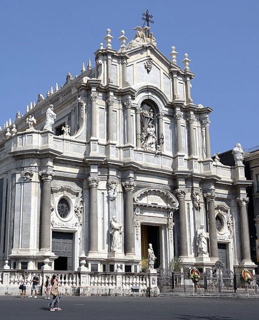 Cattedrale di Sant'Agata a Catania